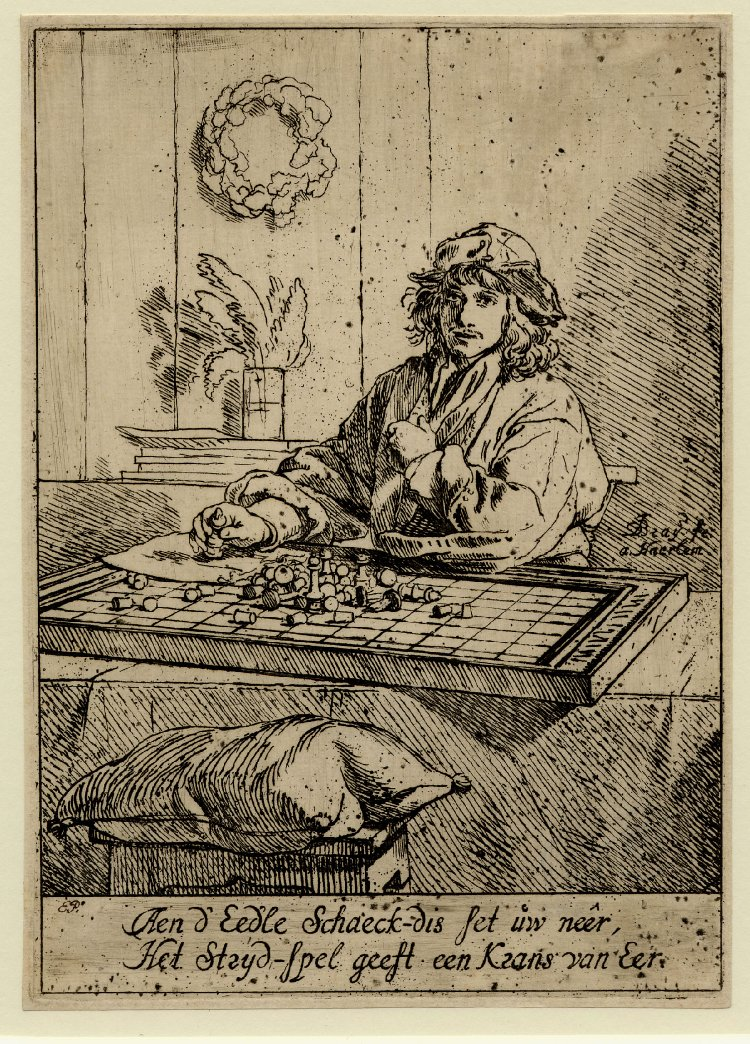 Ян де Брай (?). Шахматист. Офорт. 1660—1670 годы. Британский музей